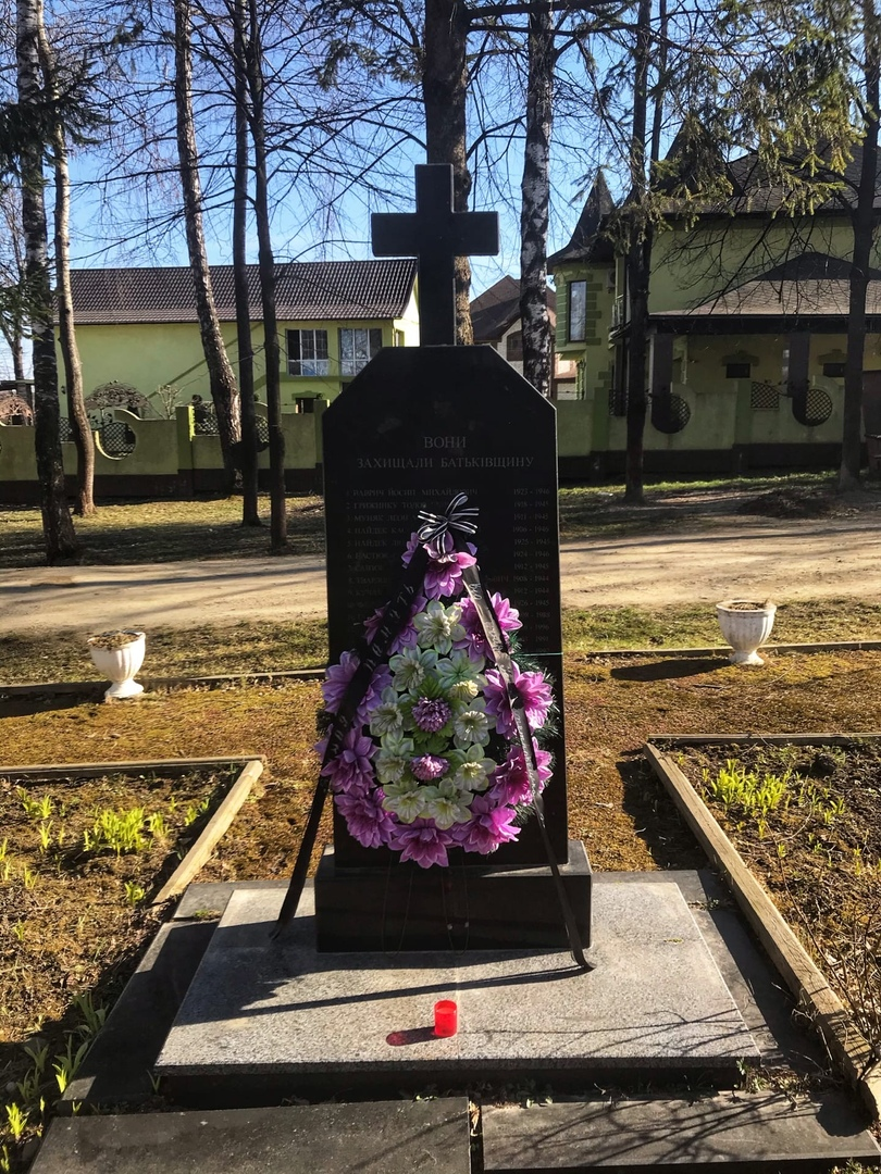 Памятник Защитникам Родины